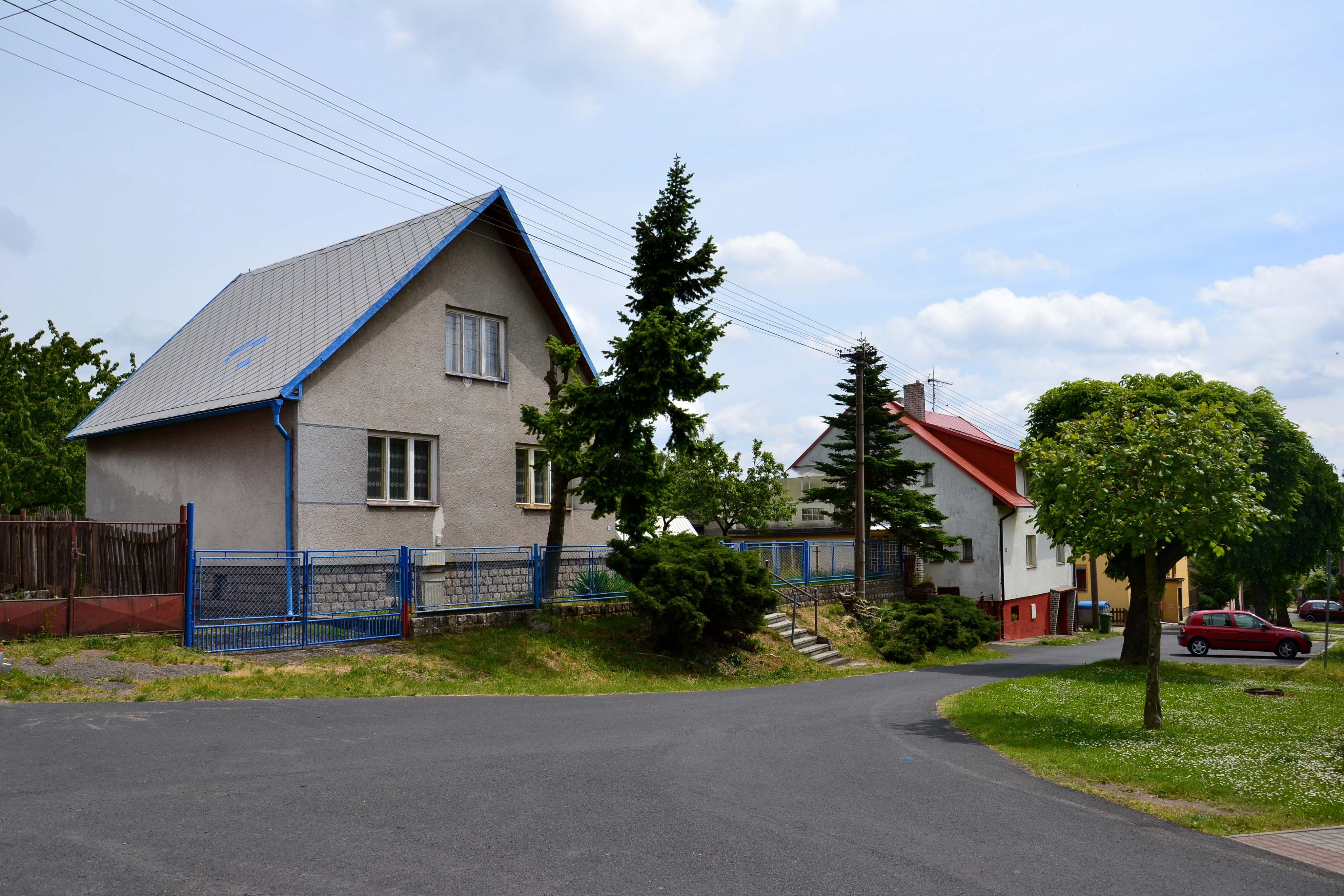 Místo - severní strana návsi